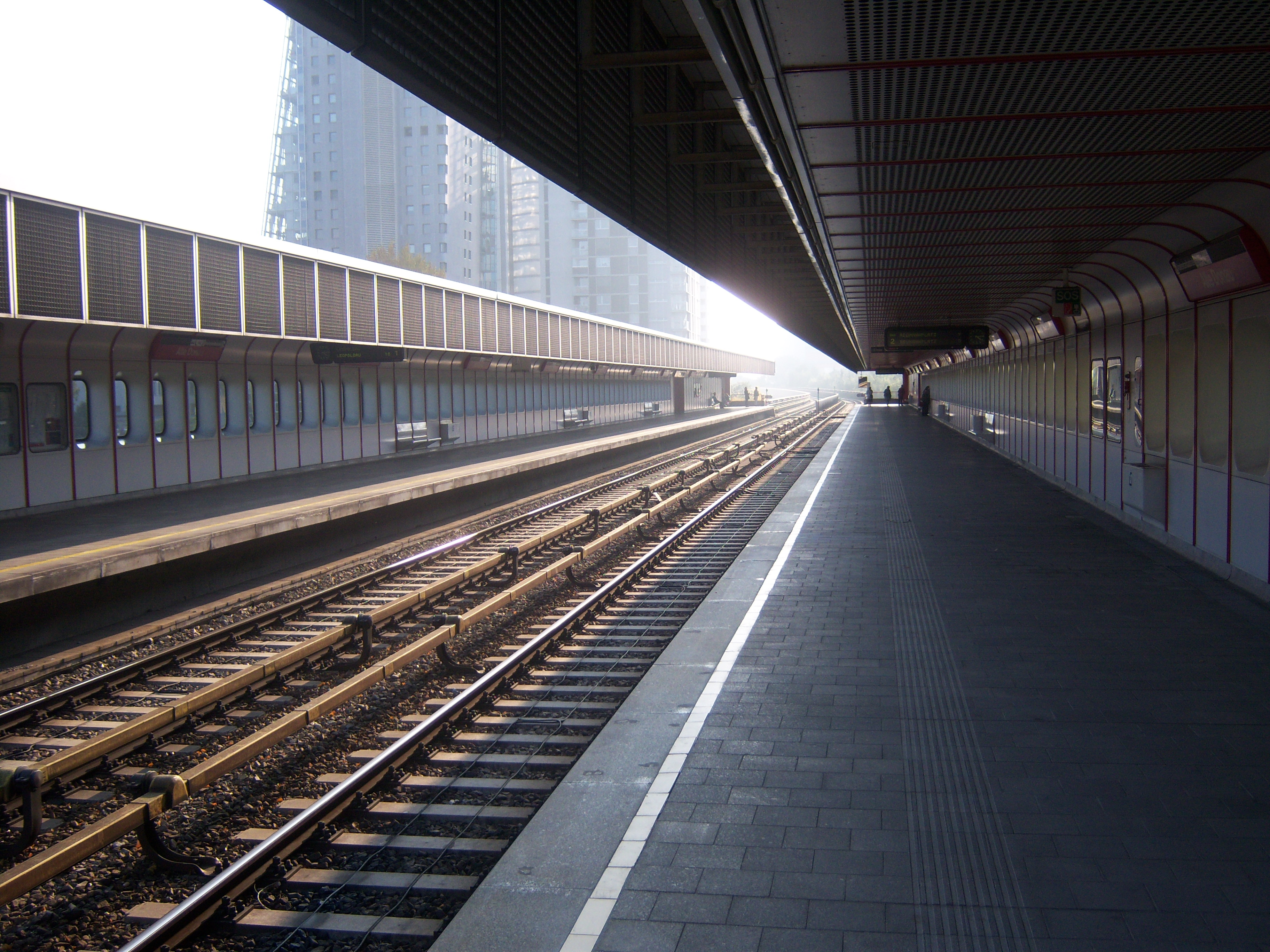 U1-Station Alte Donau